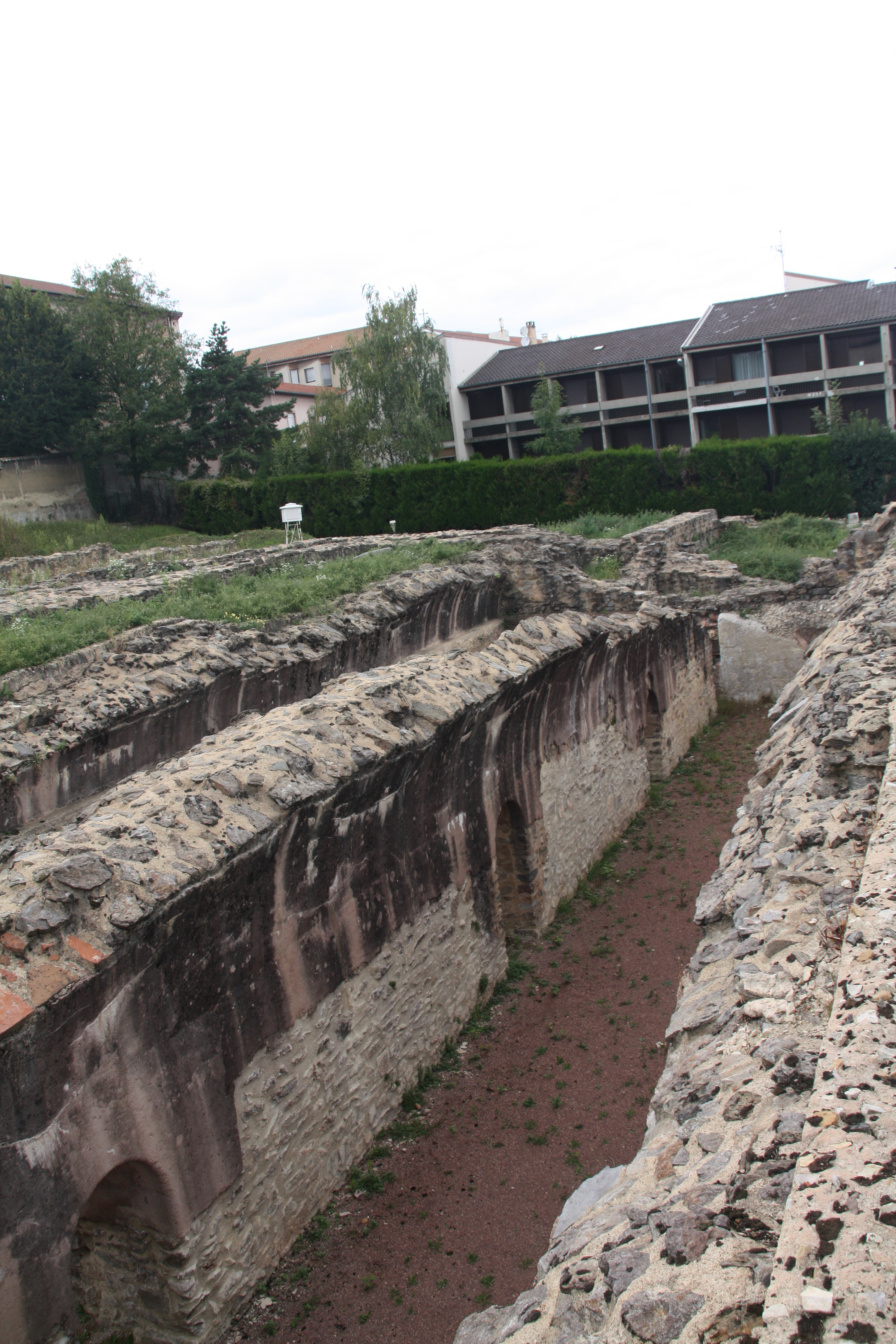 Réservoir dit de Cybèle, terminal supposé de l'Aqueduc du Gier.